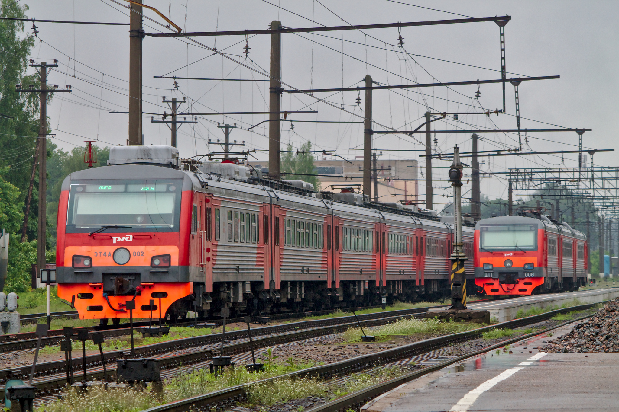 ЭТ4А-002 и ДТ1-008, станция Луга-I. см. фото 596114 в альбоме автора